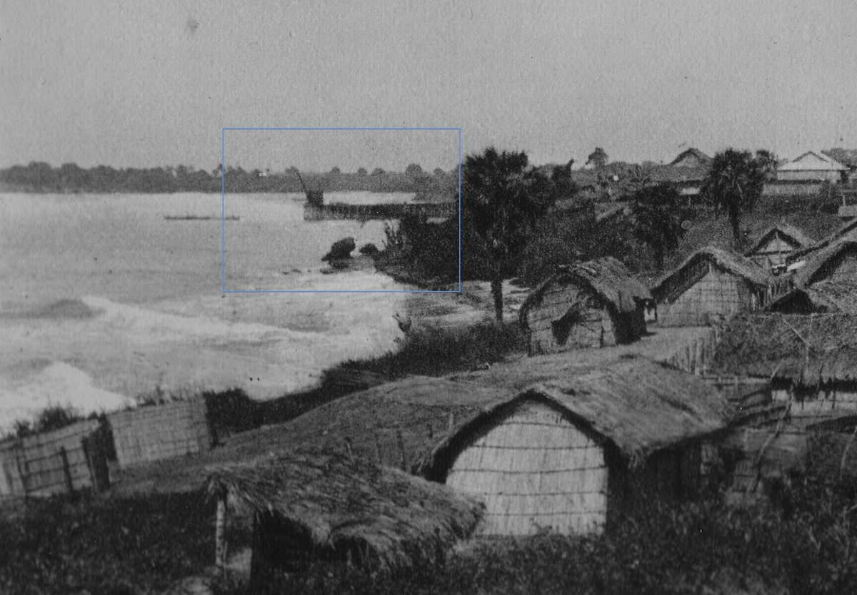 Le CFCO (Chemin de Fer Congo-Ocean) - AEF (Afrique Equatoriale Française) - Les affiches - 1934